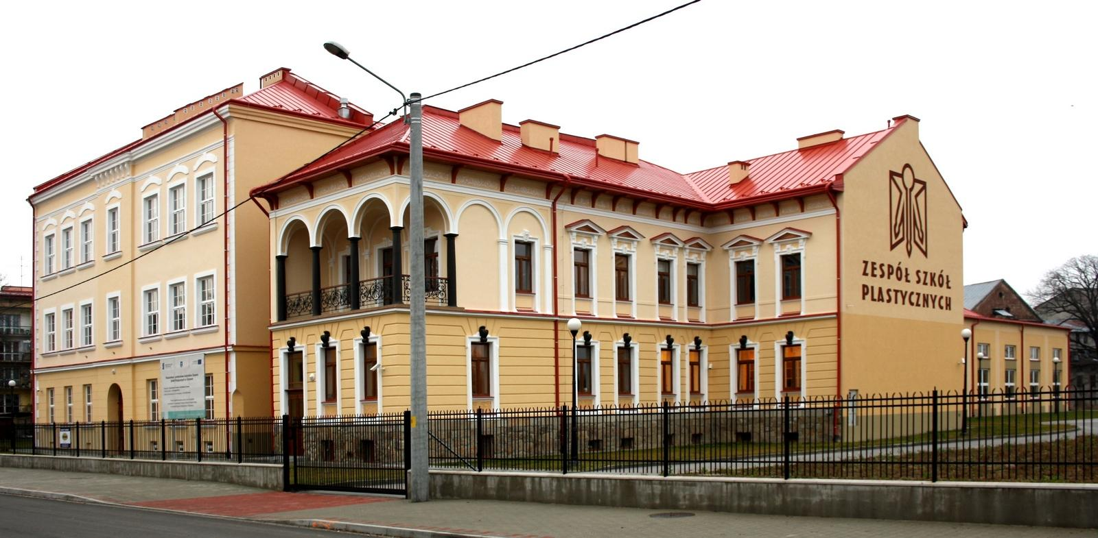 Zespół Szkół Plastycznych w Tarnowie